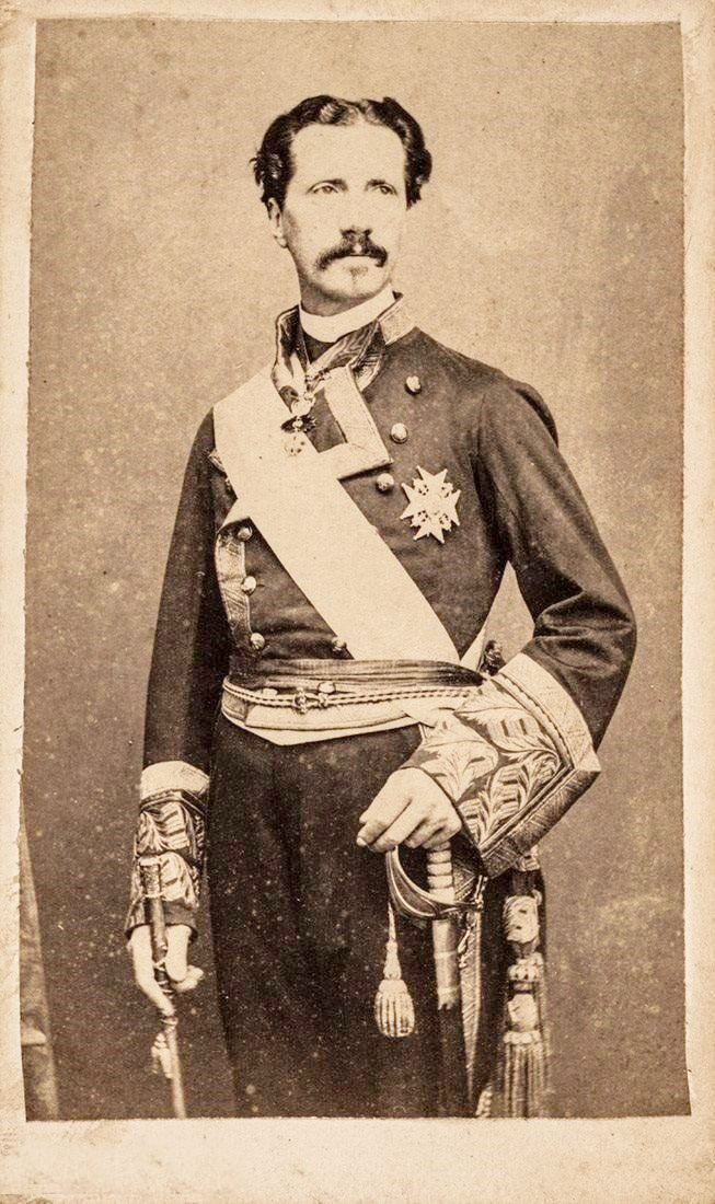 Infante Enrique de Borbon, duque de Sevilla (1823-1870).